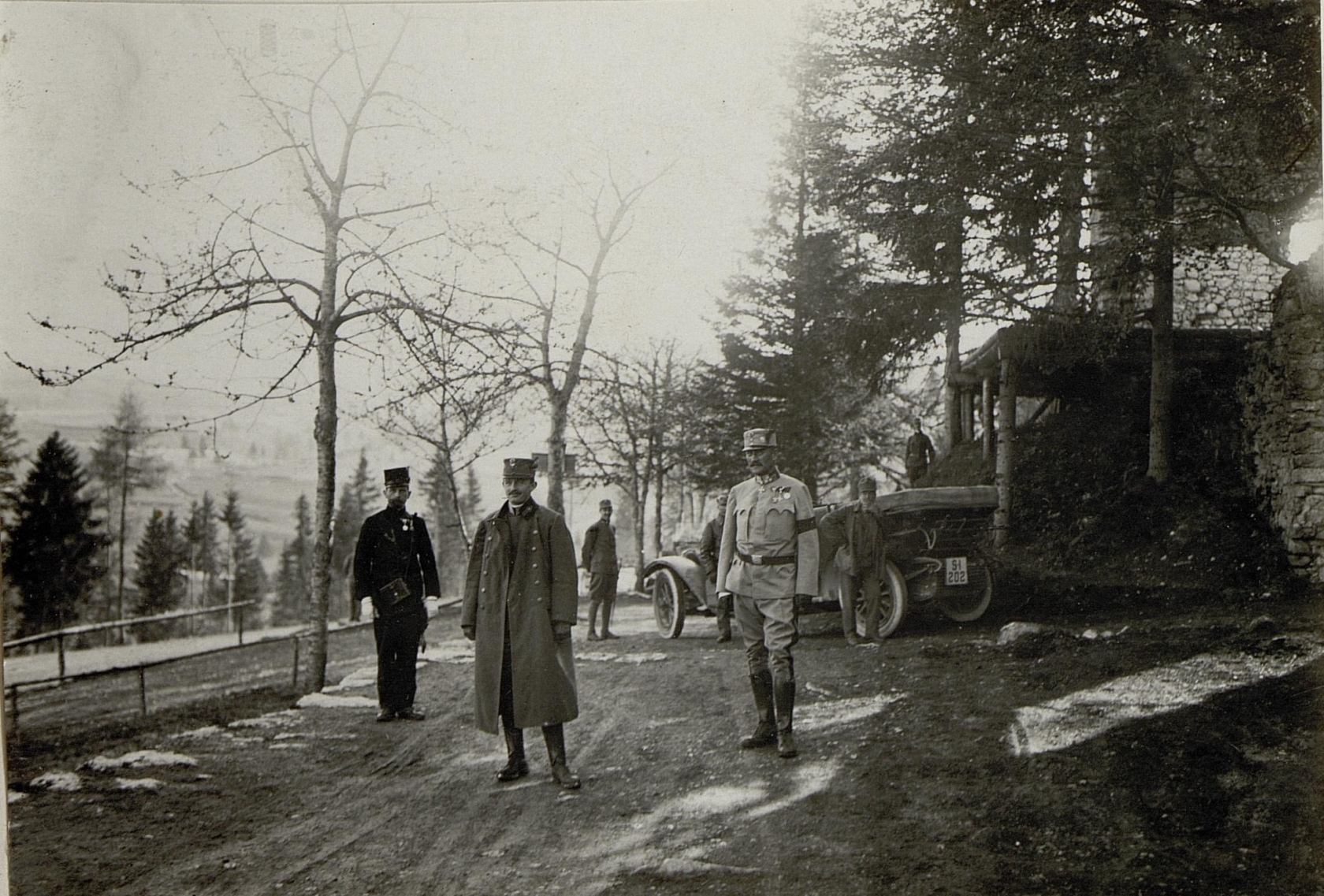 Karl I. besucht Folgaria (Vielgereuth), 15.5.1917, rechts von ihm steht der österreichische Verteidigungsminister Alois Schönburg-Hartenstein